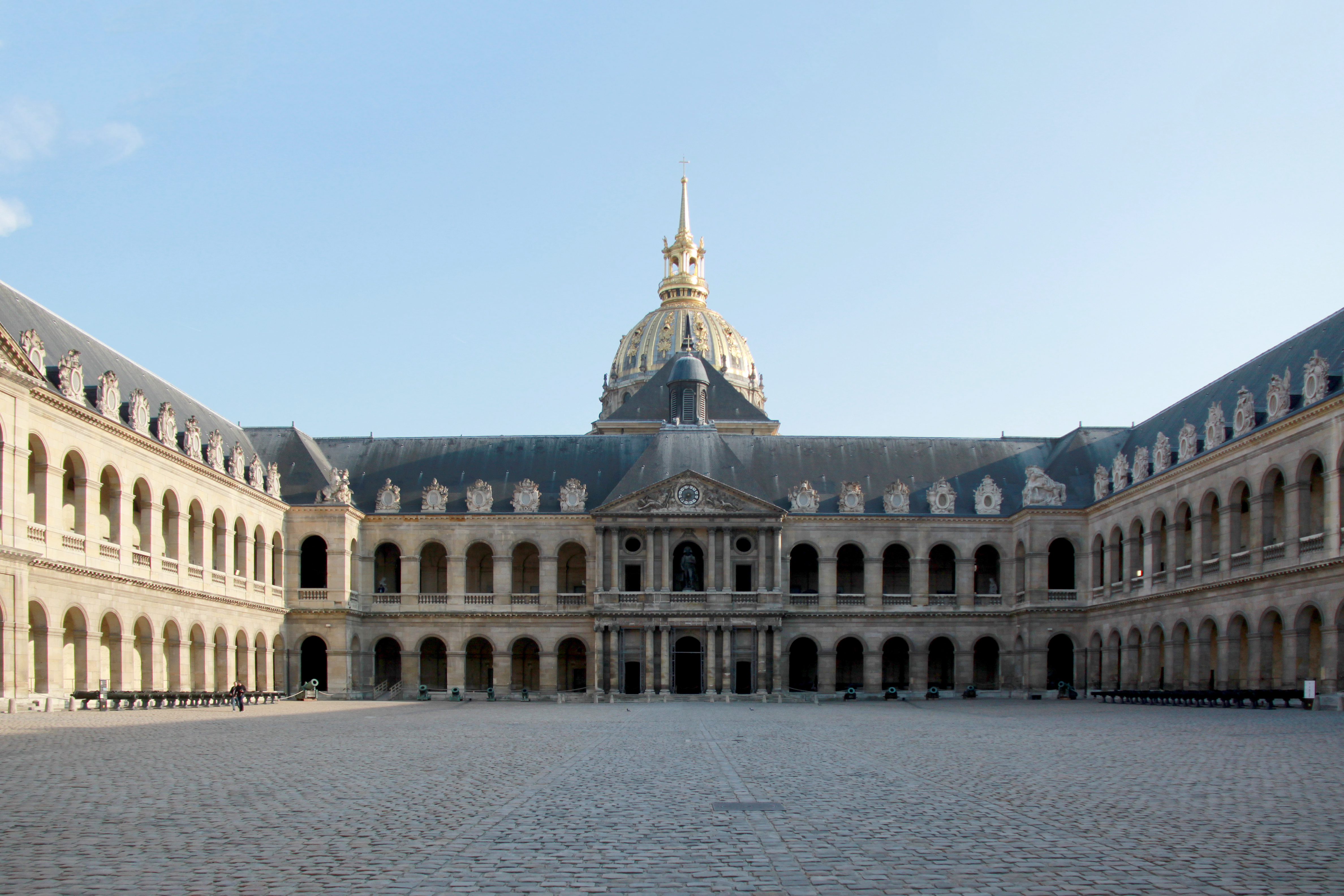 Cour d'honneur des Invalides, Paris.